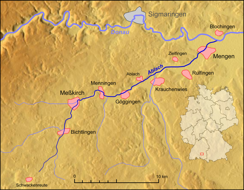 Verlaufskarte Ablach